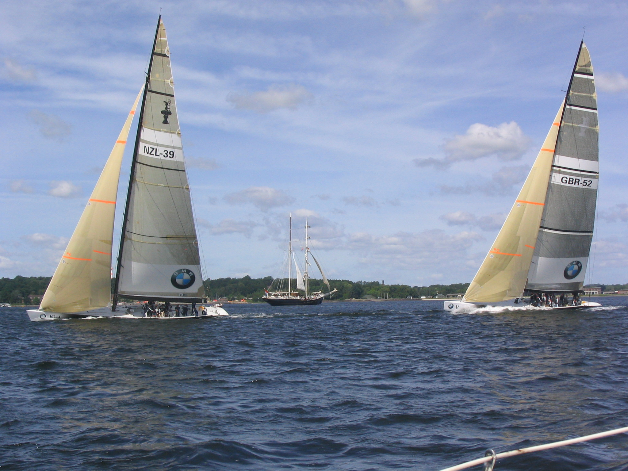 America's Cup Class GBR-52 "Valencia" und NZL-39 "Kiel" (Trainingspartner)